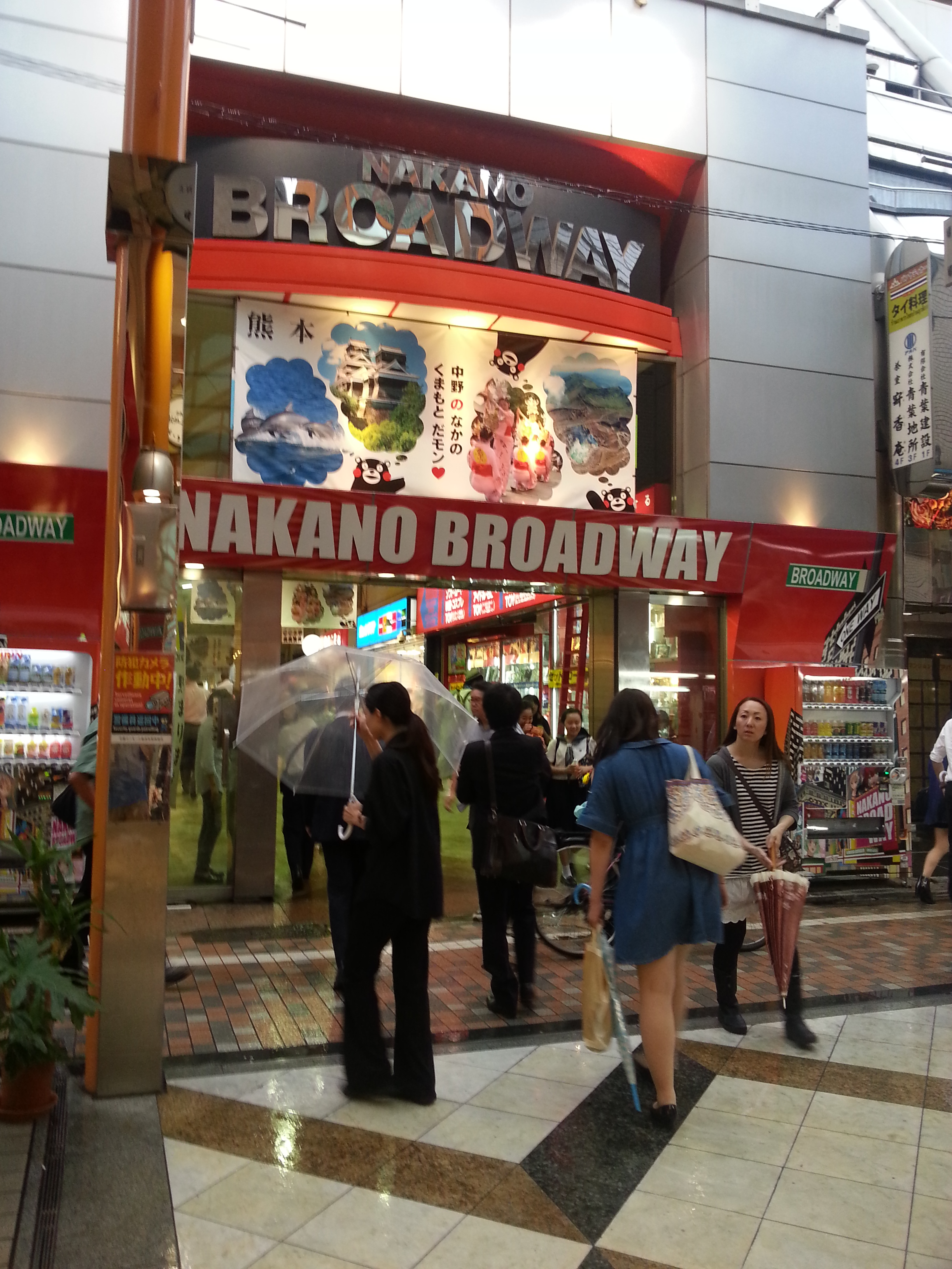 中野百老匯入口